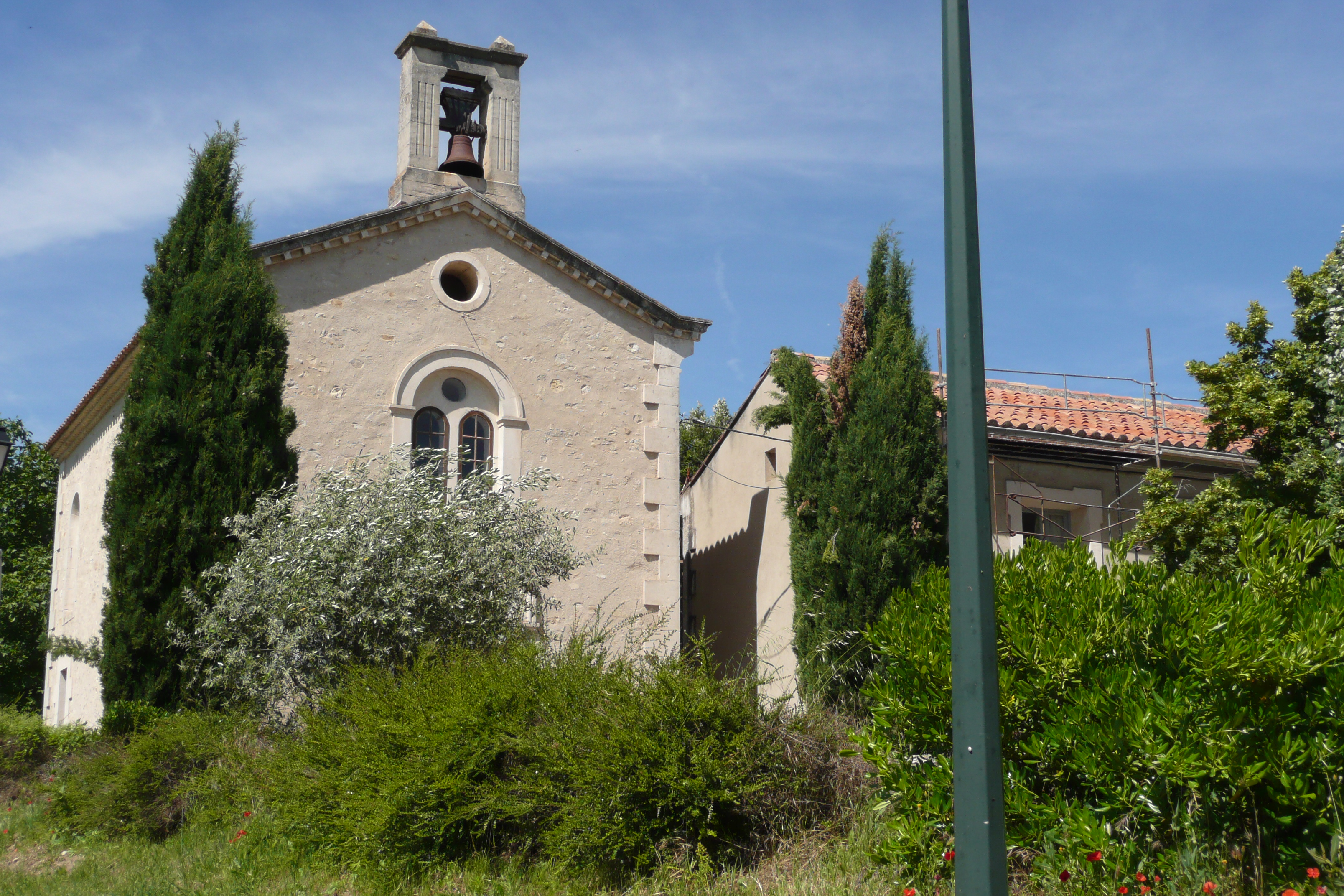 Eglise à Peypin-d'Aigues.